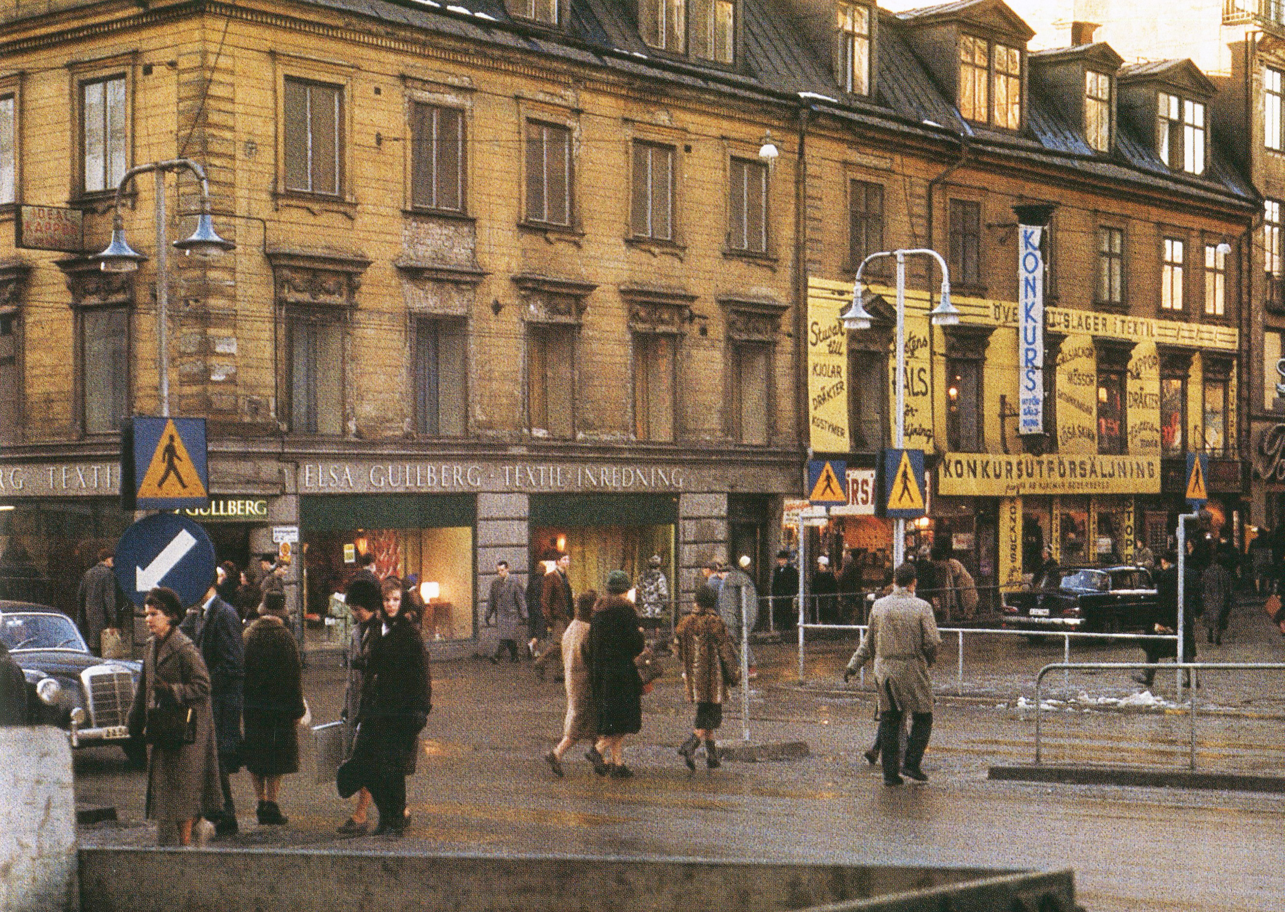 Elsa Gullbergs affär vid Drottningatan i Stockholm 1962